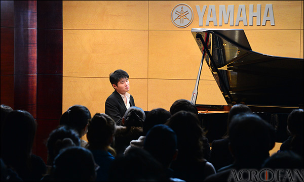 야마하 그랜드피아노 페어 - 임동민 피아노 콘서트